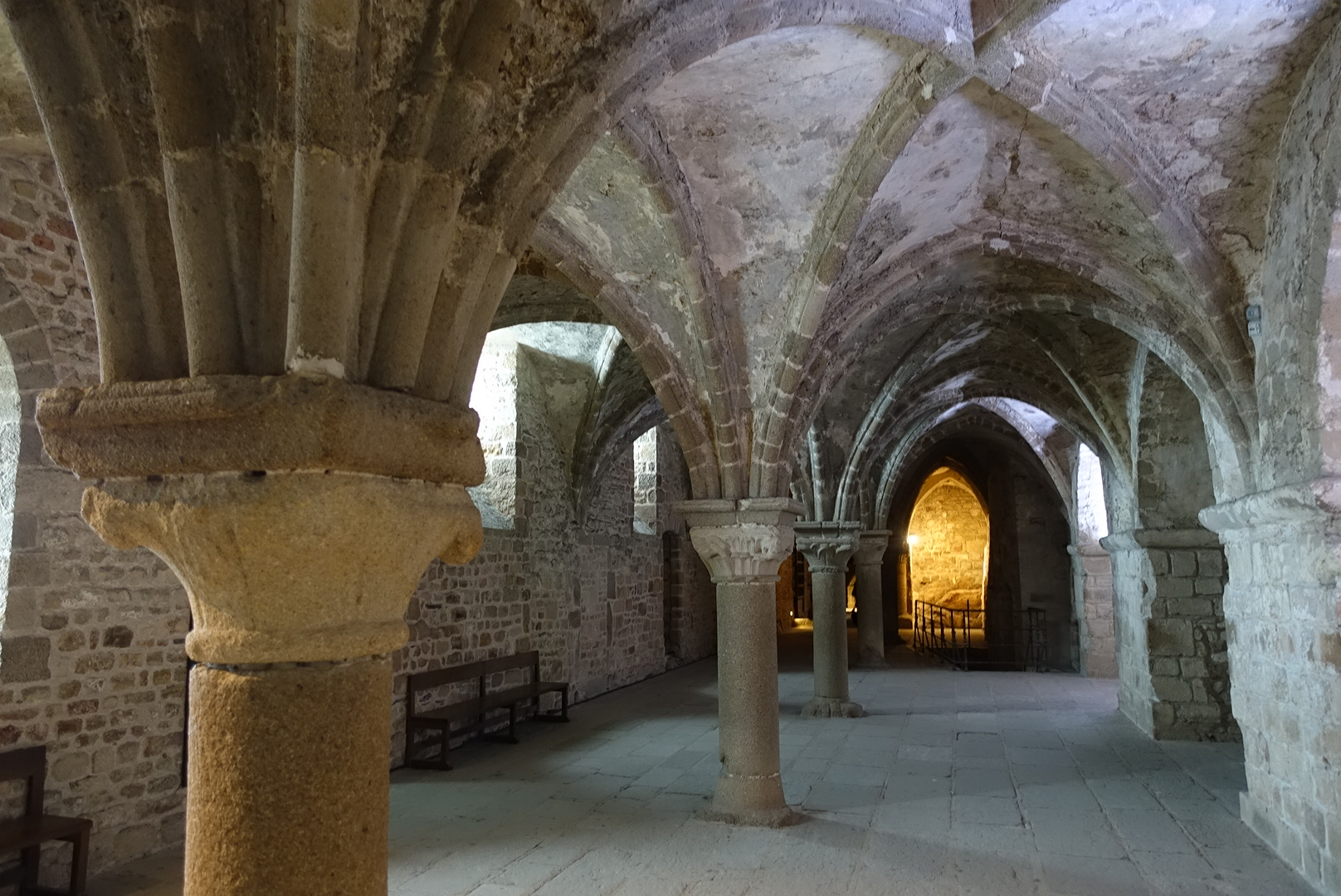 Abbaye du Mont-Saint-Michel. Promenoir vu de l'ouest.